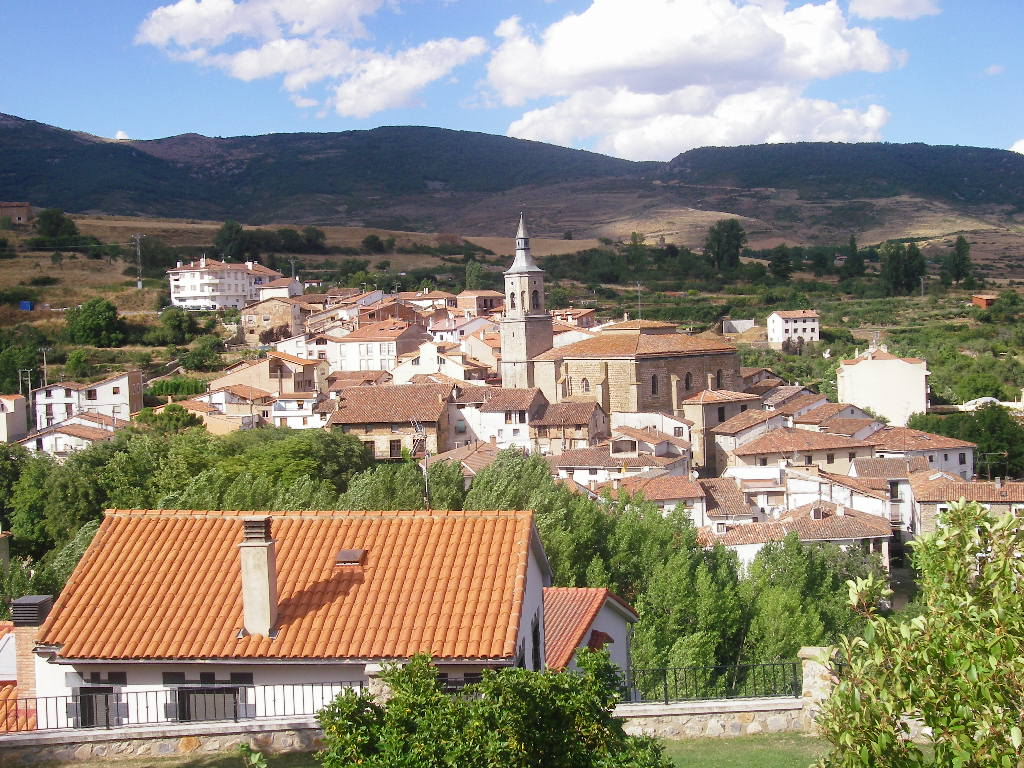 Torrecilla.